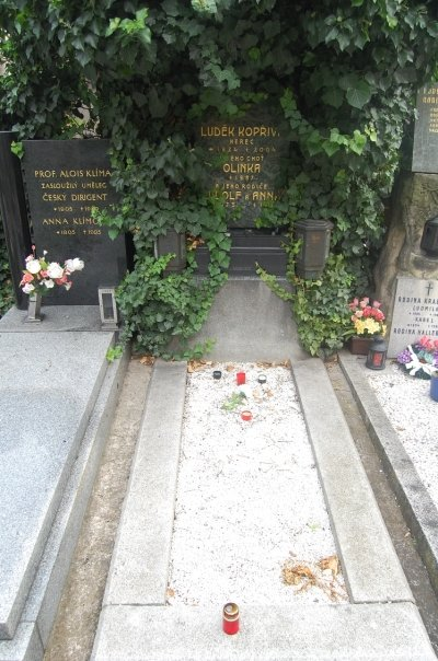 Hrob herce Luďka Kopřivy na Pražském Vyšehradě.